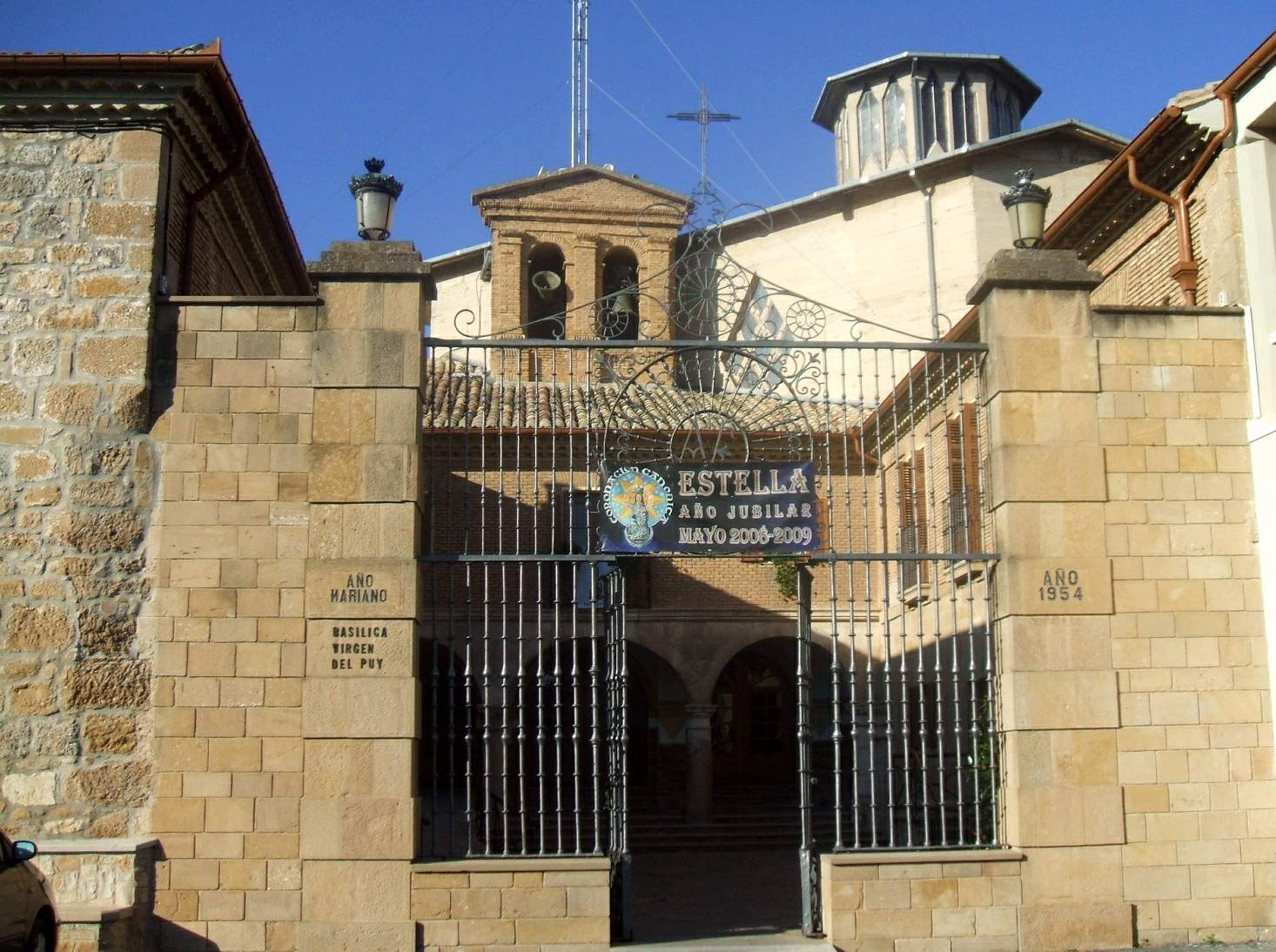 Basílica de Nuestra Señora del Puy (Estella)